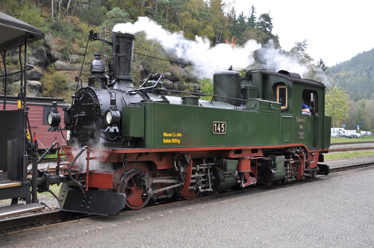 Lokomotive 99 555 (sä IVK 145) im Bahnhof Kurort Oybin, Zittauer Schmalspurbahn